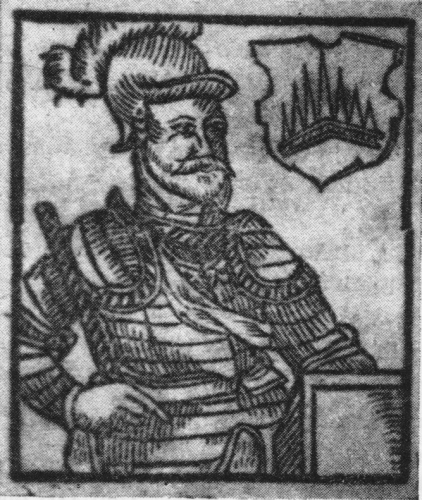 Oldřich Černohorský z Boskovic a na Novém Hradě 1406-1431